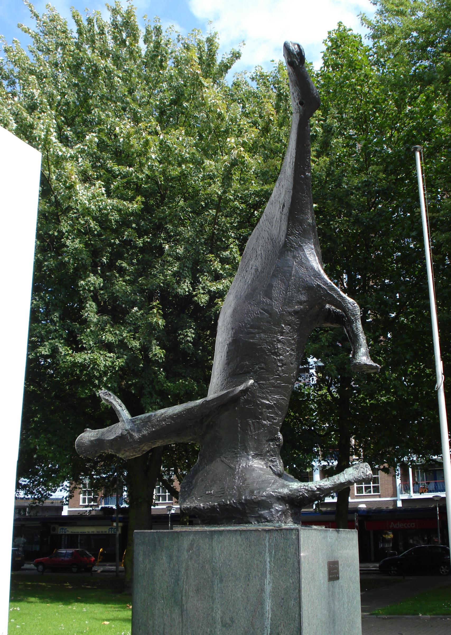 Rotterdam, Pleinweg/Mijnsherenlaan. Kunstwerk "Il Grande Miracolo" (1953) van Marino Marini. Rotterdam/The Netherlands.